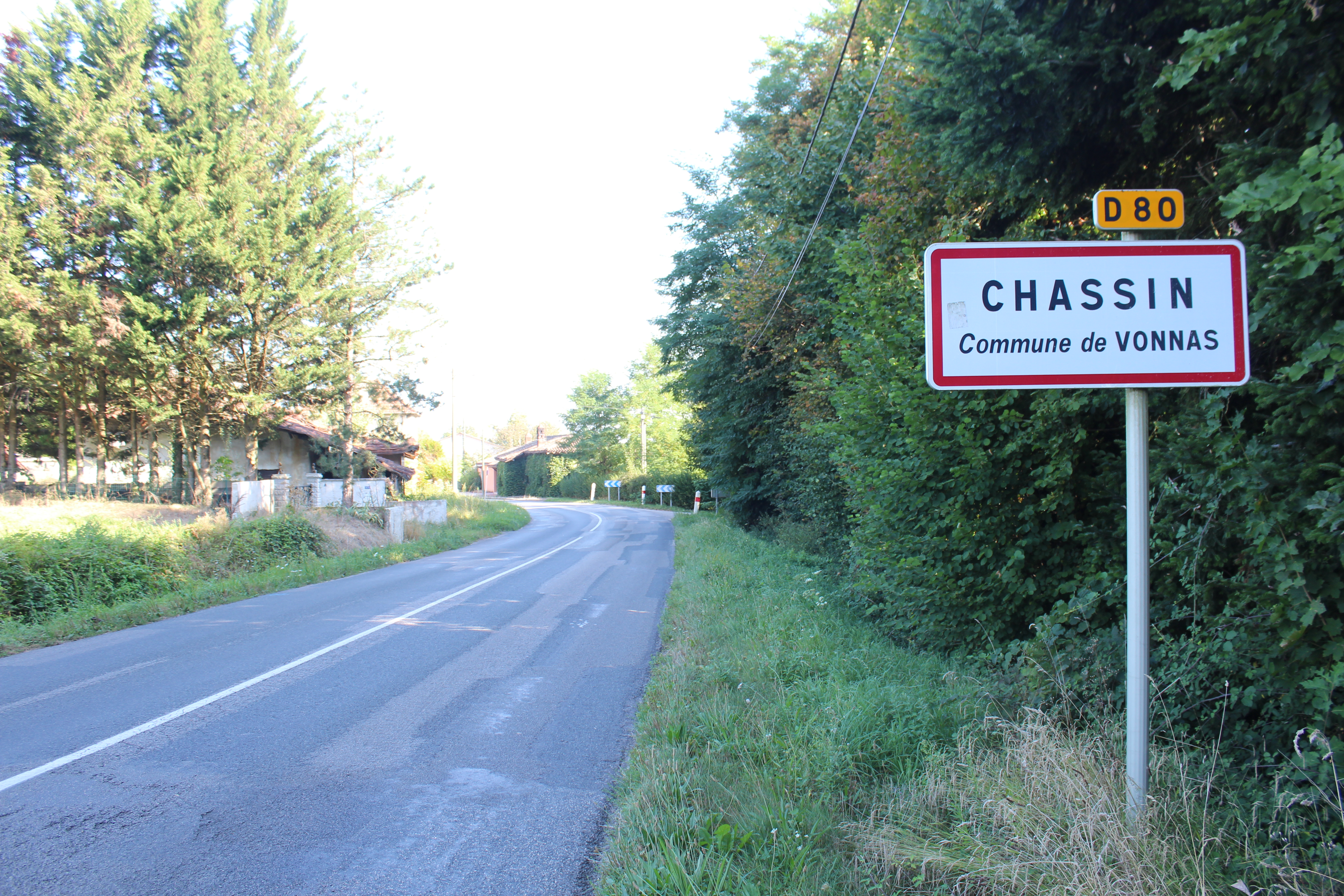 Panneau d'entrée dans le hameau de Chassin, dans la commune de Vonnas.